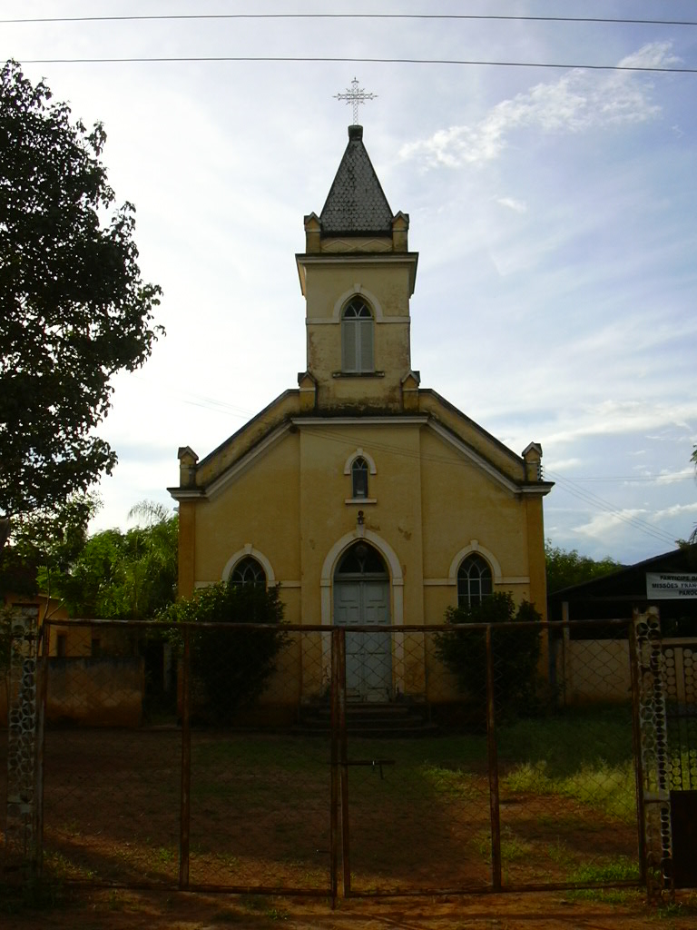 A igrejinha do bairro rural de Canoas, no município de Mococa, São Paulo, Brasil.